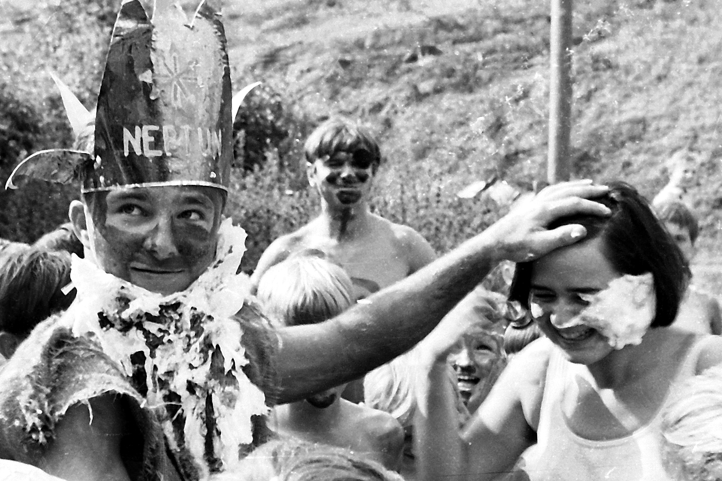 02.08.1969 DDR 5501 [99765] Kalkhütte (Urbach), Heideweg 1: Ferienheim (GMP: 51.510557,10.905851) und Kinderferienlager (GMP: 51.510836,10.905523) des VEB Mineralölwerk Lützkendorf (aus DDR 4206 Krumpa/Geiseltal, GMP: 51.295323,11,857894). Neptunfest im Waldbad (GMP: 51.502161,10.906791). [F]19690802141AR.JPG(c)Blobelt